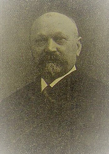 Josef Košťál, český pedagog a folklorista